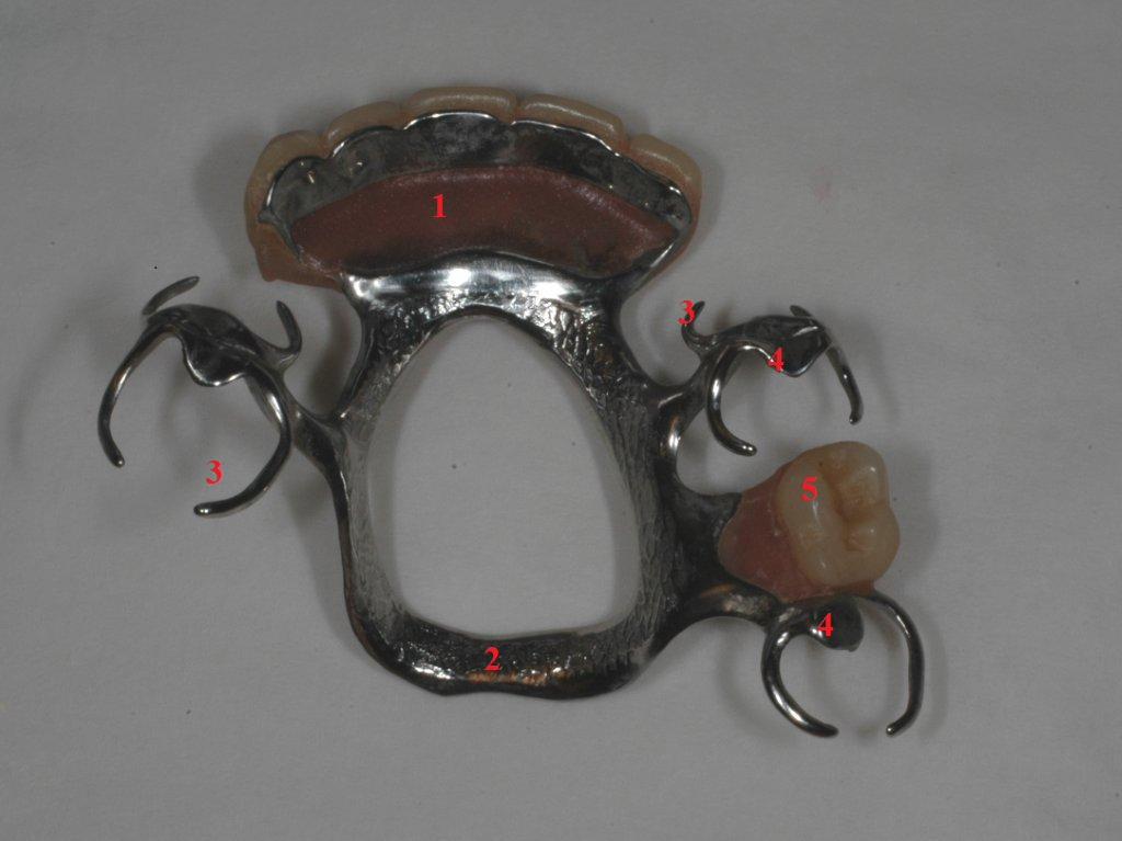 En typisk delprotese med ulike elementer. 1) Protesebasis av akryl 2) Metallskjellett 3) Klammer 4) Opplegg 5) Plasttenner